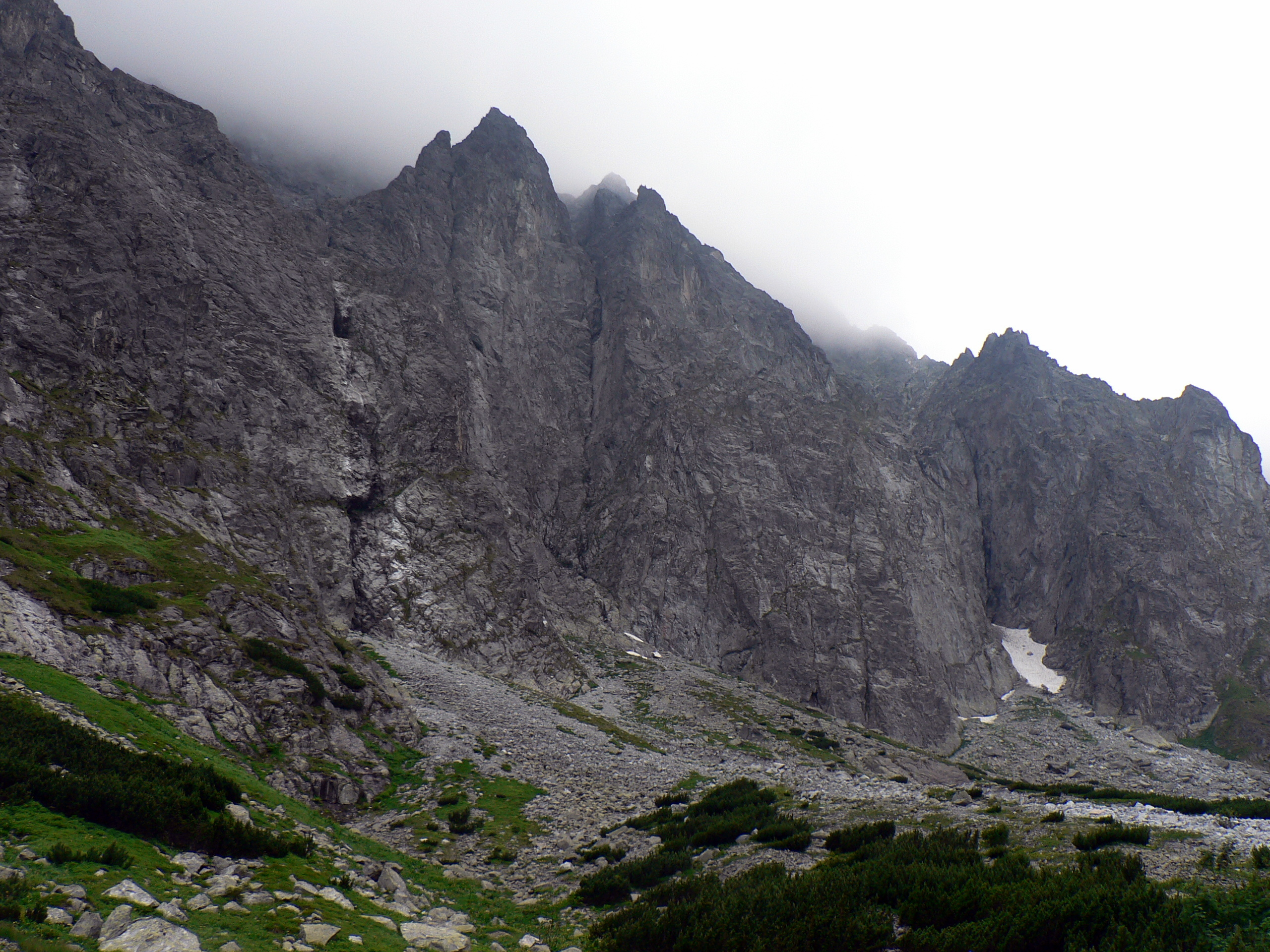 Północna ściana Małego Kieżmarskiego Szczytu znad Czarnego Stawu Kieżmarskiego. Widoczne (od lewej) Złoty Komin, Złoty Kopiniak, Złota Baszta, Złoty Strażnik, Wielki Złoty Ogród, Wielka Złota Kazalnica, Pośrednia Złota Kazalnica